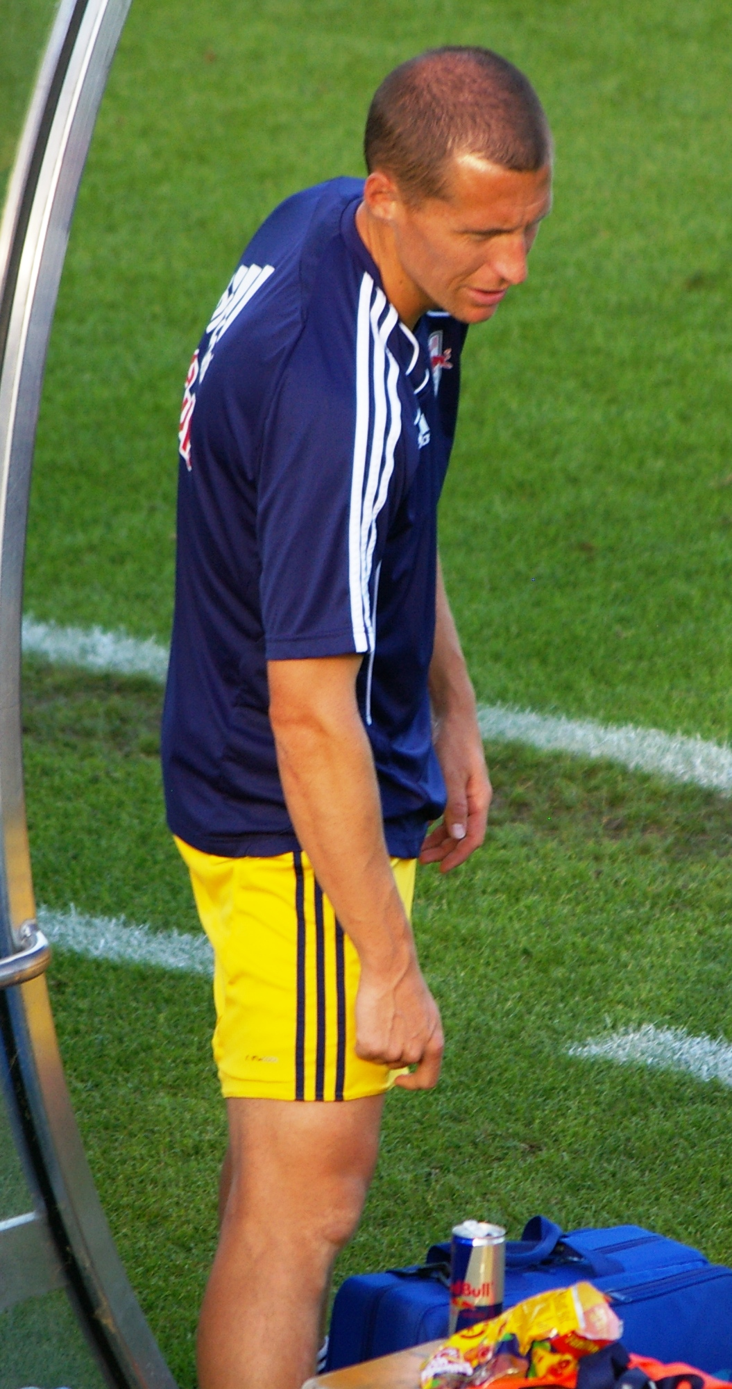 Cup 1. Runde